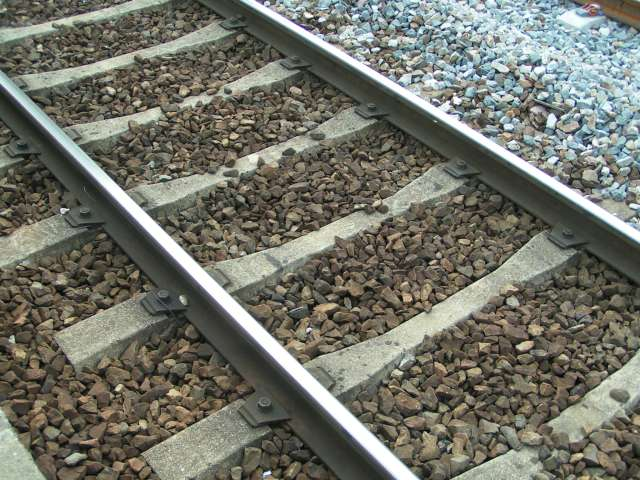 Description: voie de chemin de fer avec traverses en béton de type monobloc Source: photo prise par Christophe Jacquet en gare de Jouy-en-Josas (ligne du RER C) le 20 juillet 2004 Licence: © Christophe Jacquet, 2004